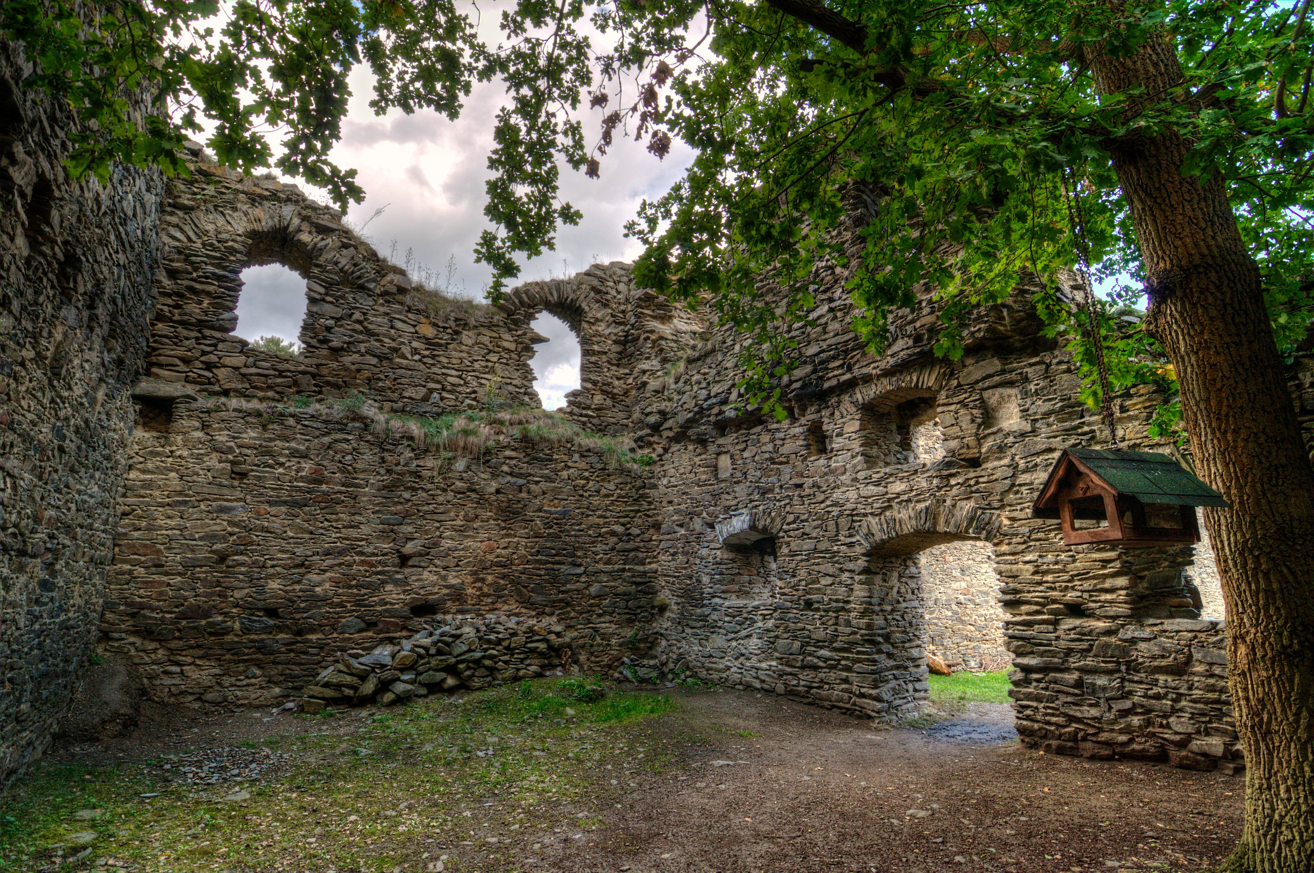 Interiér hradního paláce